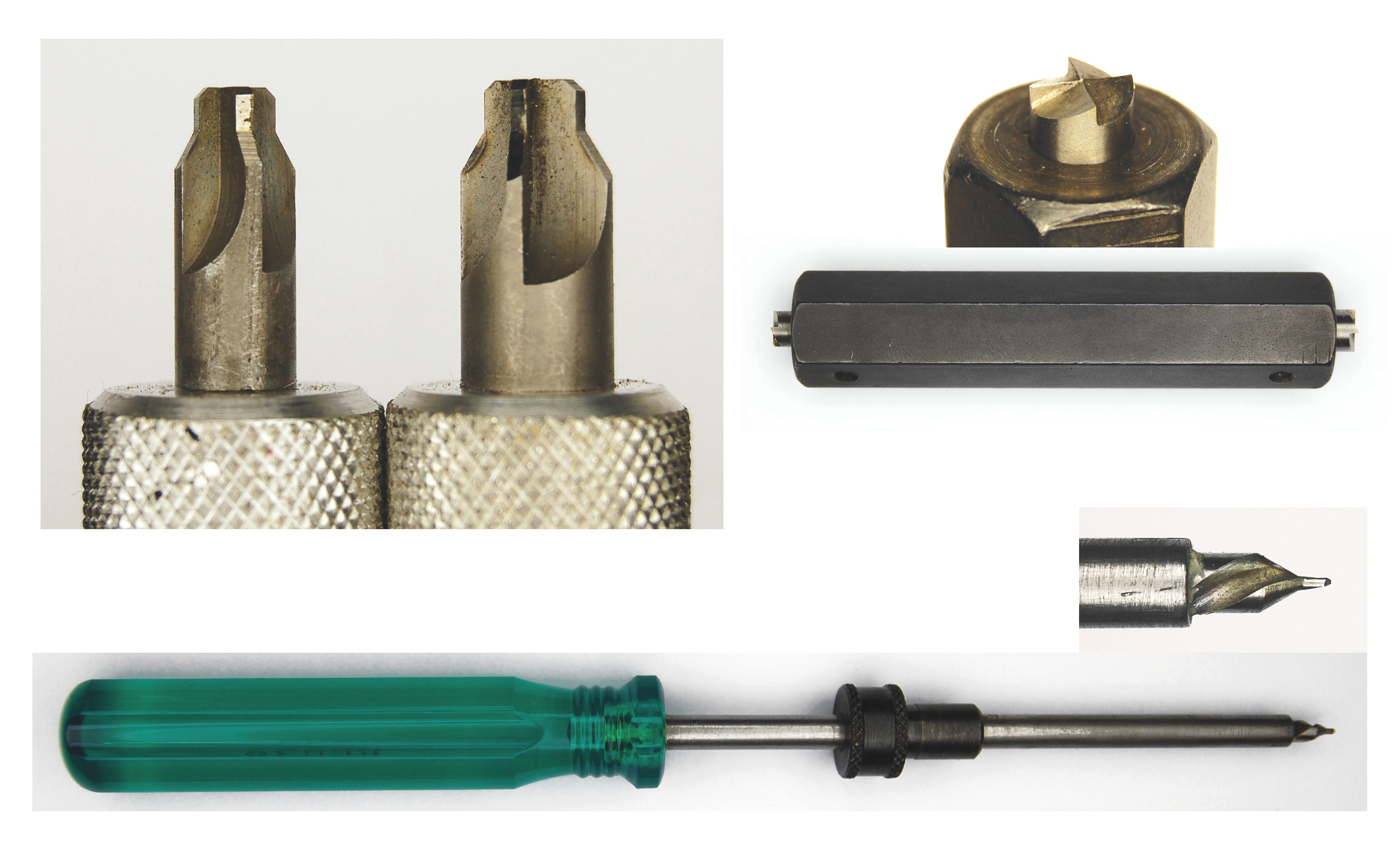 Primer pocket tools